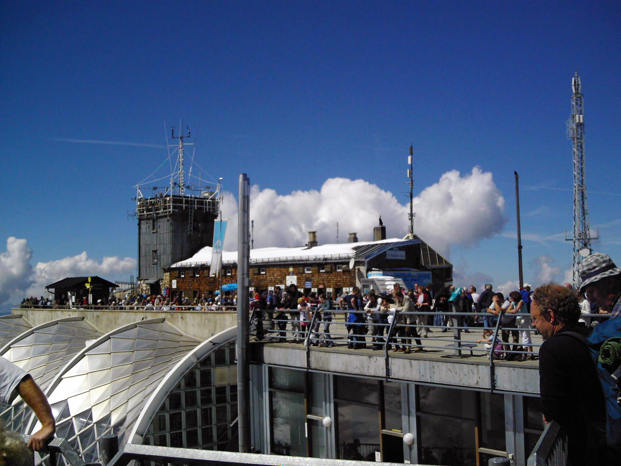 Münchner Haus auf der Zugspitze eigenes Bild Foto: Nixalsverdruss August 2005